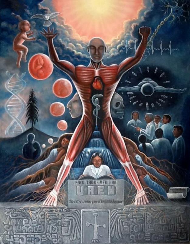 Mural ubicado en la recepción